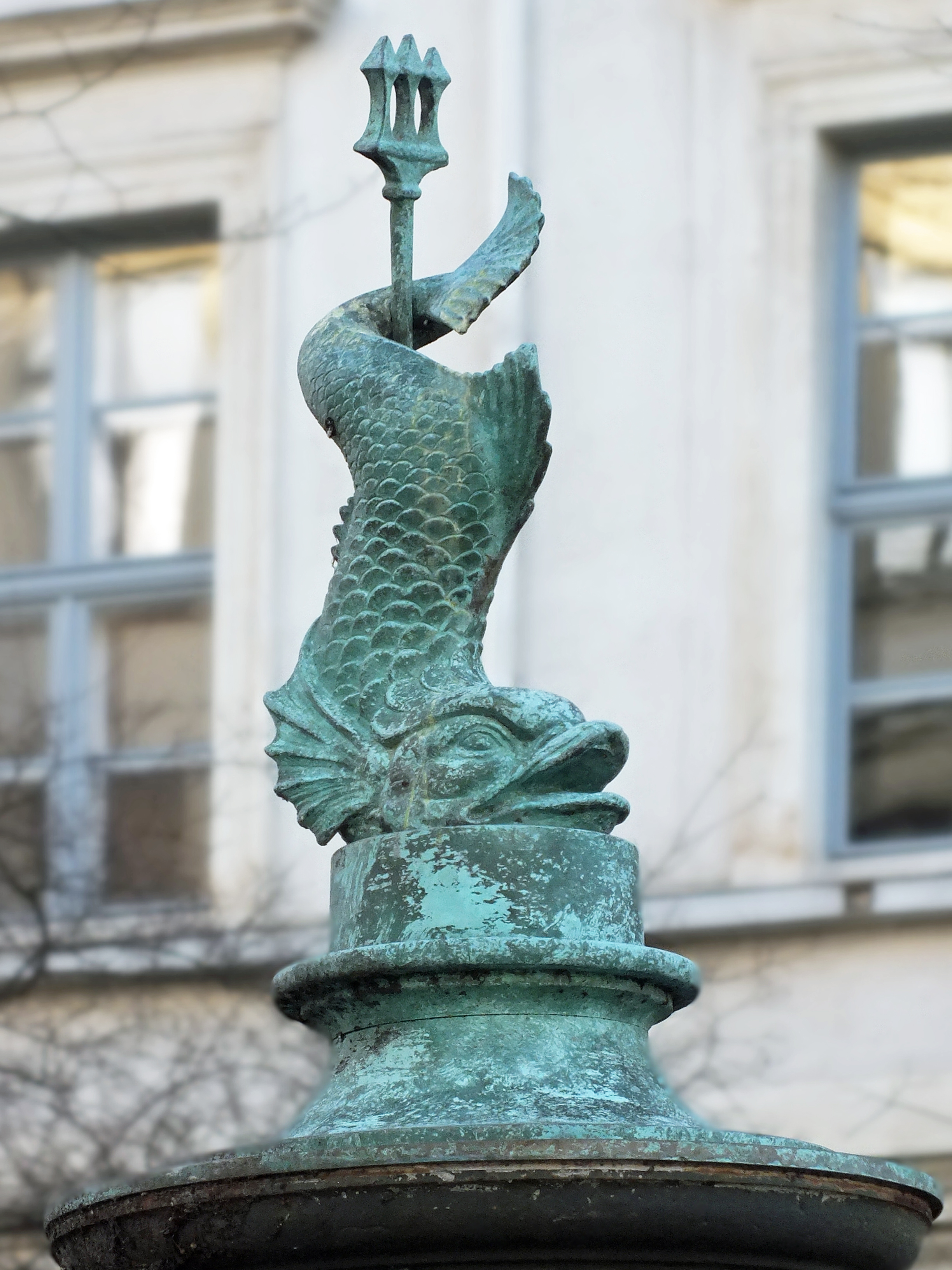 Plastik Delphin auf der Handschwengelpumpe in der Lortzingstraße Leipzig